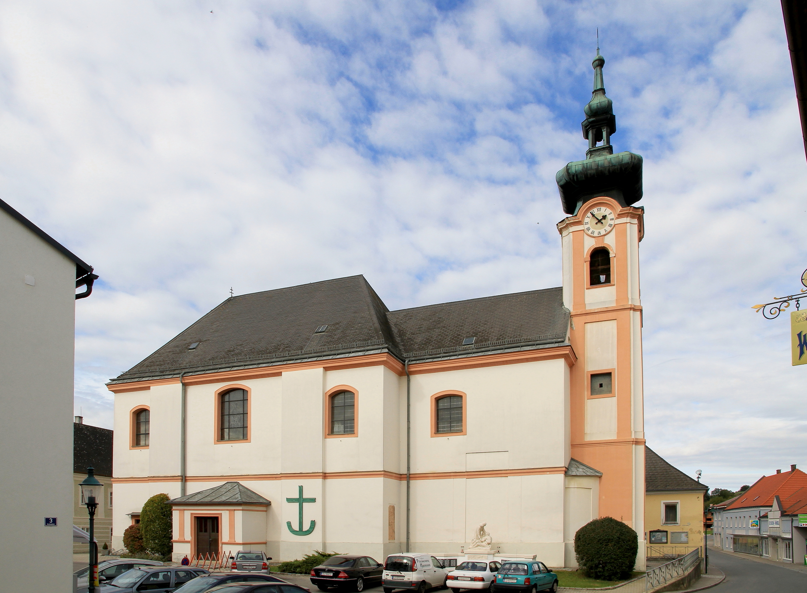 Die katholische Pfarrkirche hl. Ulrich in der niederösterreichischen Marktgemeinde Würmla. Die Kirche wurde in den 1730er Jahren errichtet. 1758 erfolgte eine Erneuerung des Presbyterium und des Turmes. Nach einem Brand wurde 1768 das Langhaus, ein dreijochiger Saalraum, neu errichtet. Die Einrichtung stammt weitgehend einheitlich aus der Mitte und dem dritten Viertel des 18. Jahrhunderts.